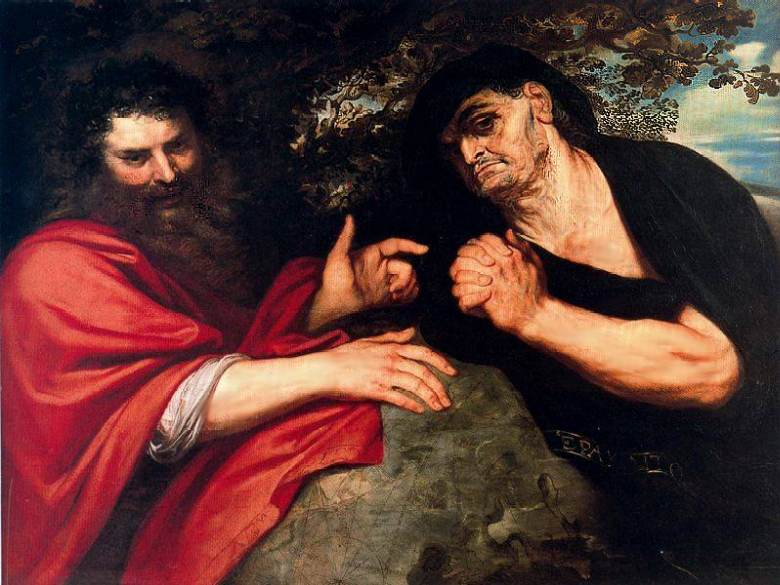 El lienzo representa a los sabios griegos Demócrito, filósofo presocrático y matemático, y a Heráclito, también filósofo.